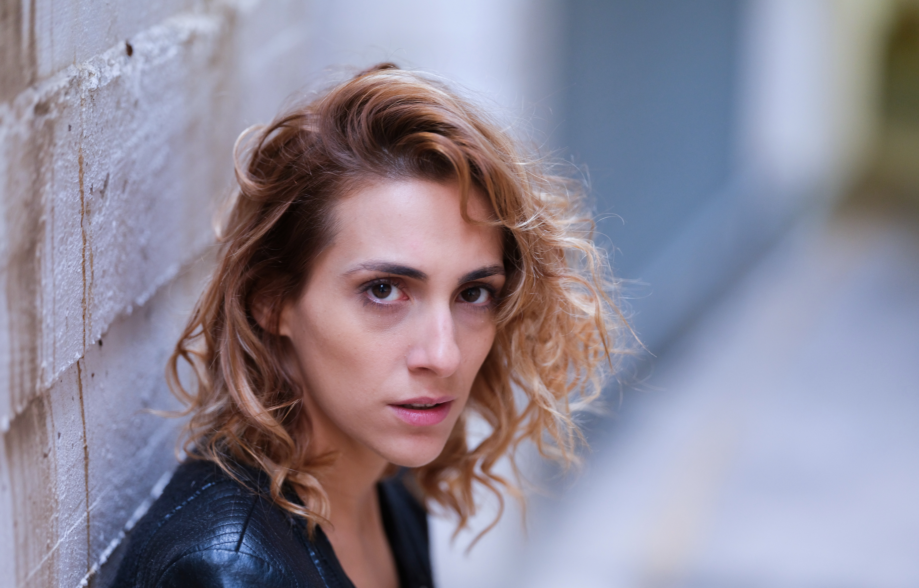 ritratto di Roberto Gioli